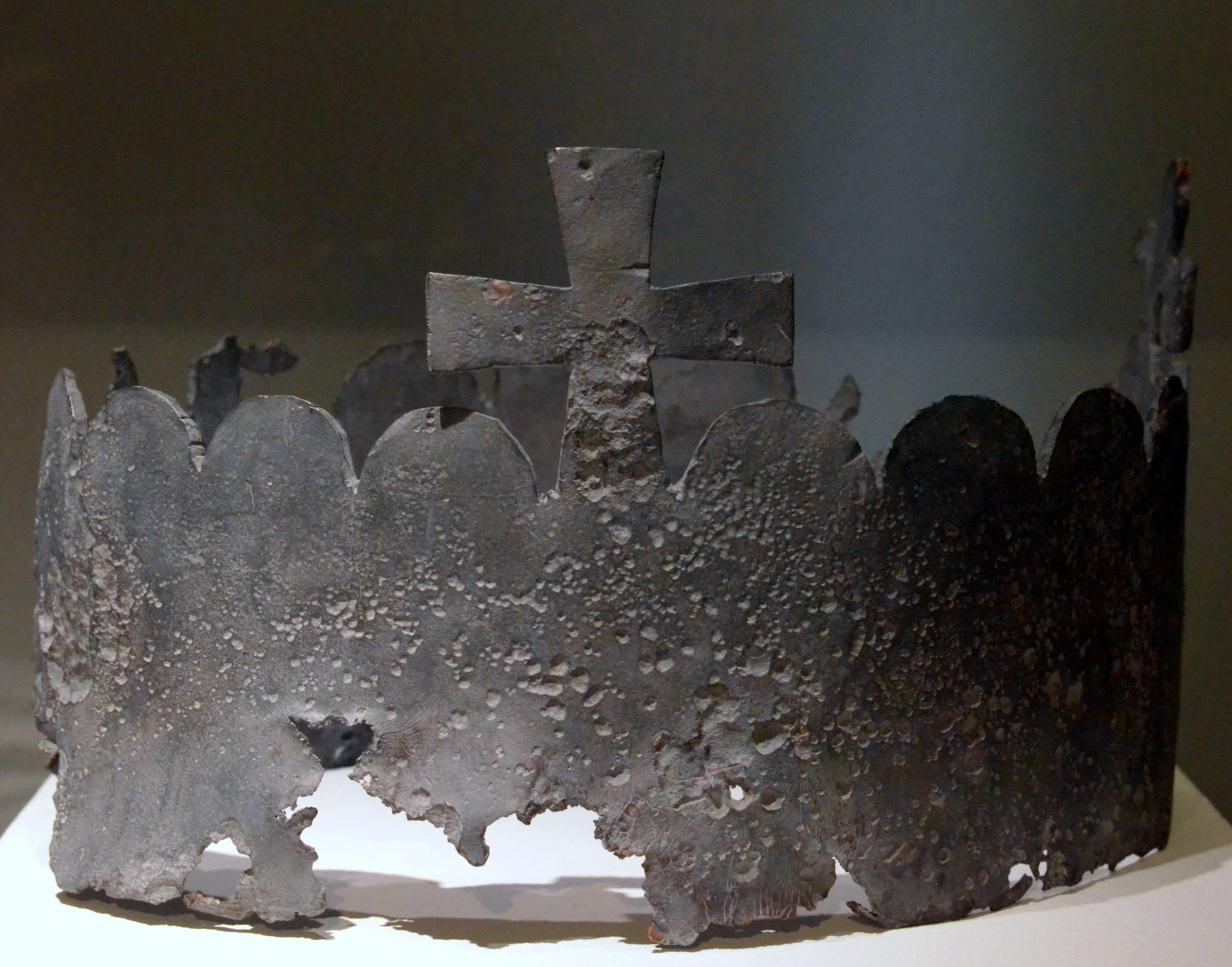 Grabkrone Kaiserin Richenzas von Northeim. Material: Blei. Alter: vor ihrer Grablegung 1141.